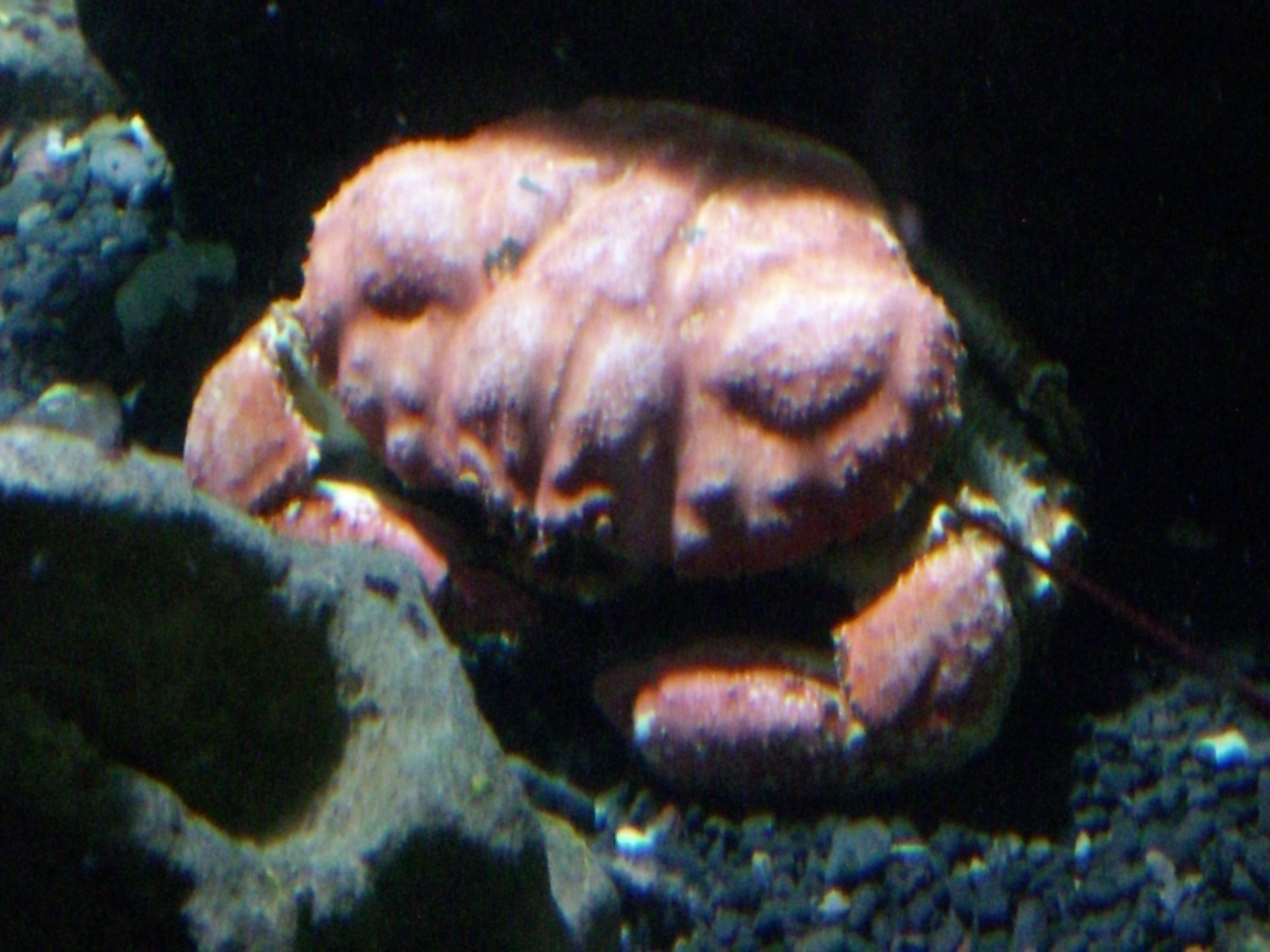 Tasmanian Giant Crab (Pseudocarcinus gigas)